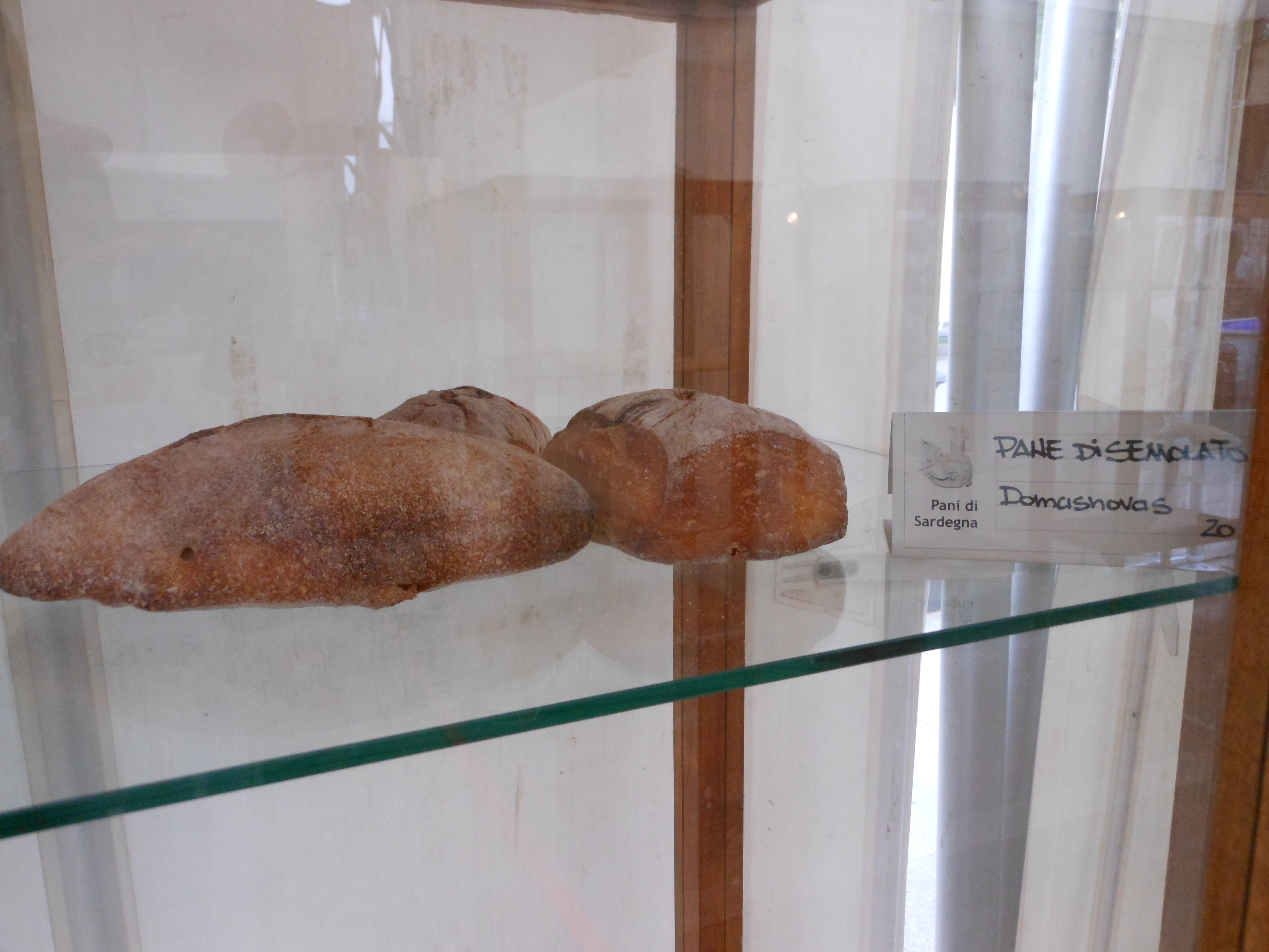 Pane tradizionale